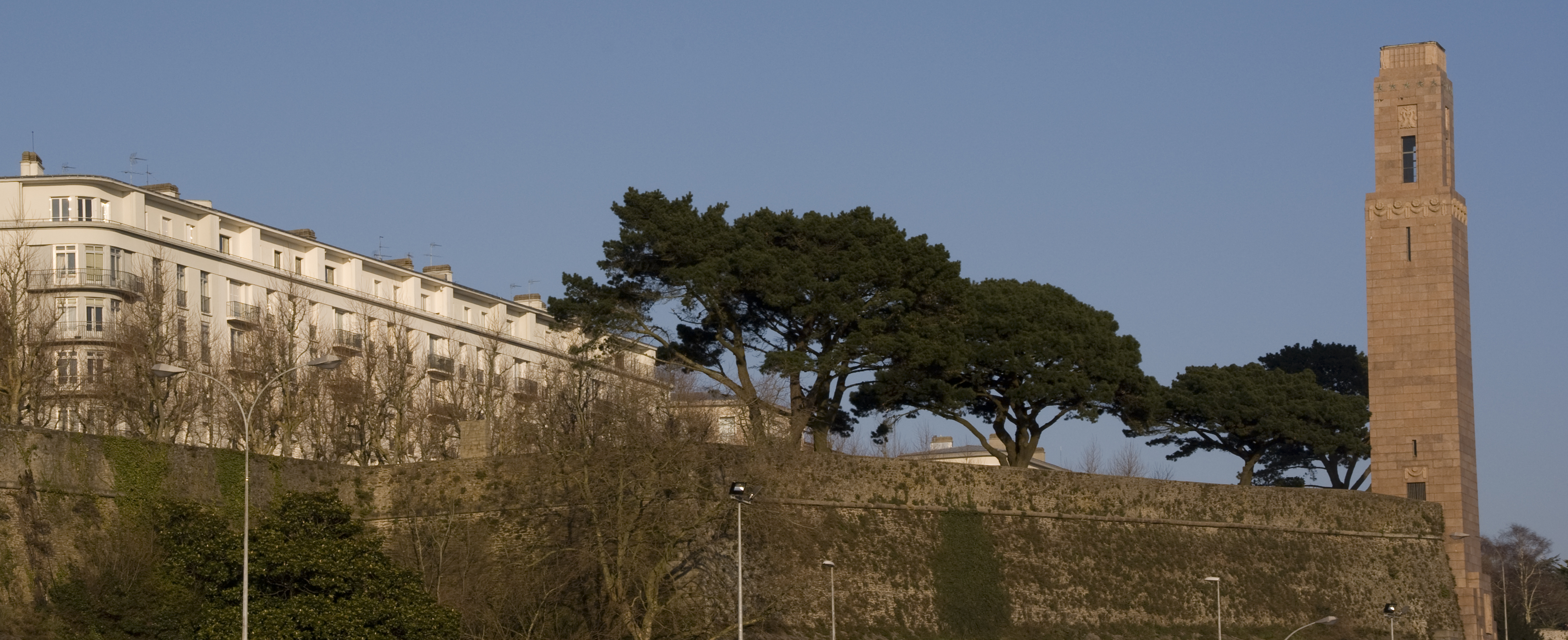 Le cours d'Ajot, de Brest - Finistère